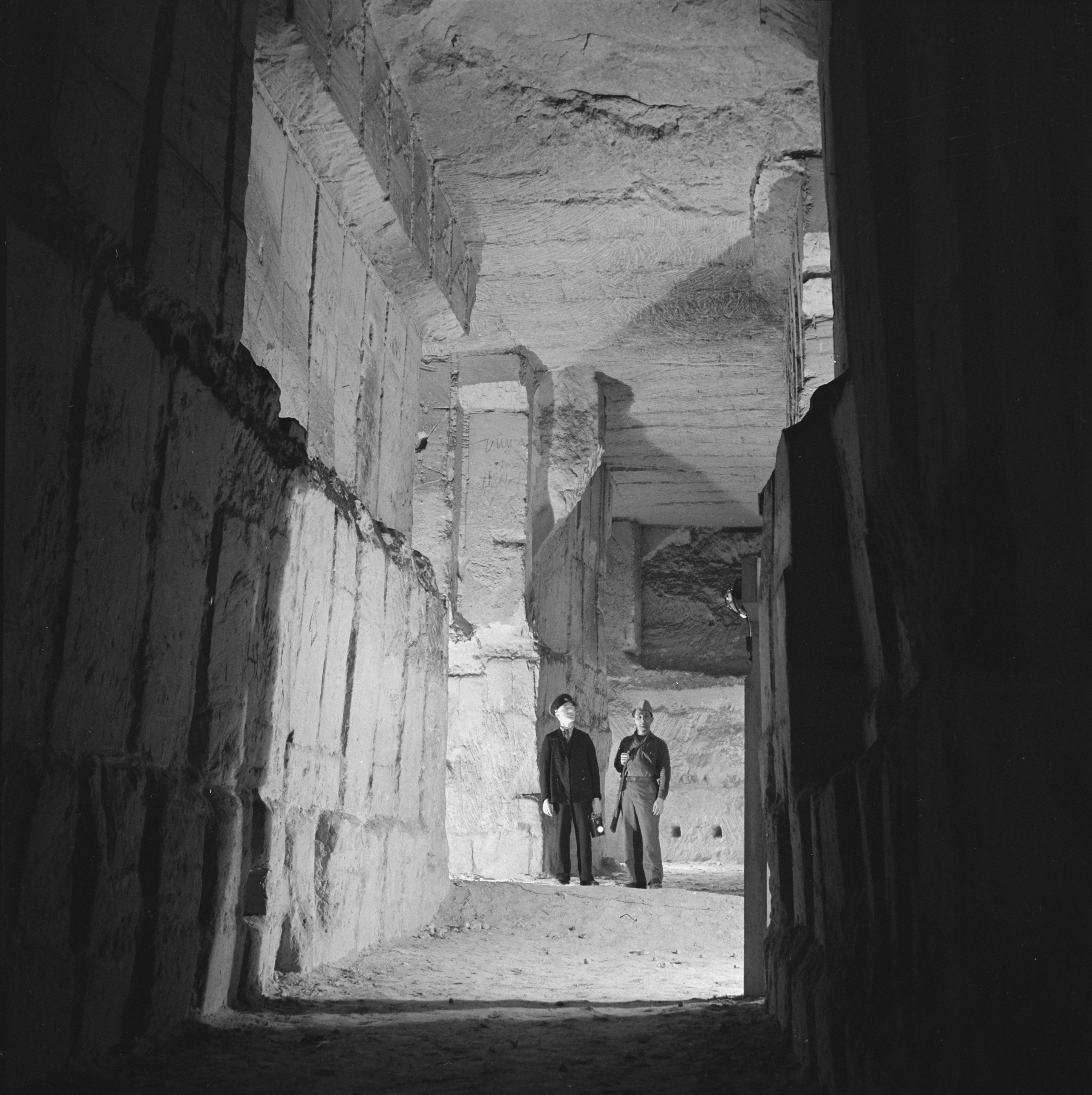 Collectie / Archief : Fotocollectie Anefo Reportage / Serie : Kunst: Kunstschatten St. Pietersberg Beschrijving : [Militaire bewaker en een suppoost in de mergelgrot] Datum : 27 juli 1945 Locatie : Maastricht Trefwoorden : kunst, tweede wereldoorlog Fotograaf : Fotograaf Onbekend / Anefo, [onbekend] Auteursrechthebbende : Nationaal Archief Materiaalsoort : Negatief (zwart/wit) Nummer archiefinventaris : bekijk toegang 2.24.01.03 Bestanddeelnummer : 900-2413